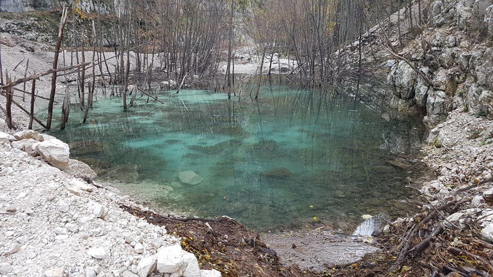 Laghetto nella Gola dell'Infernaccio (Monti Sibillini), formatosi in seguito al sisma del novembre 2016